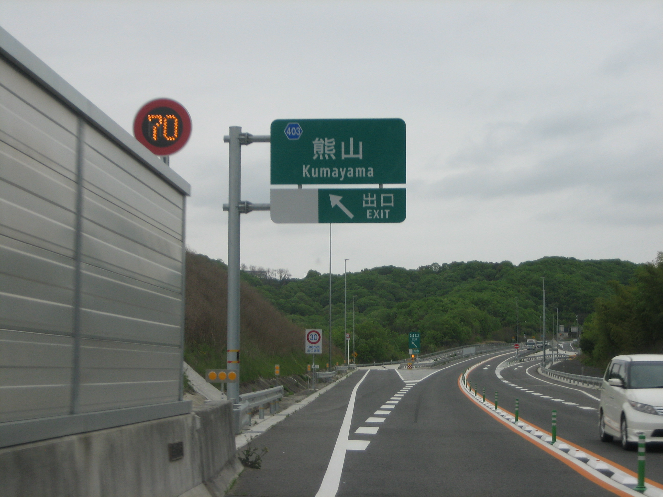 熊山IC出口